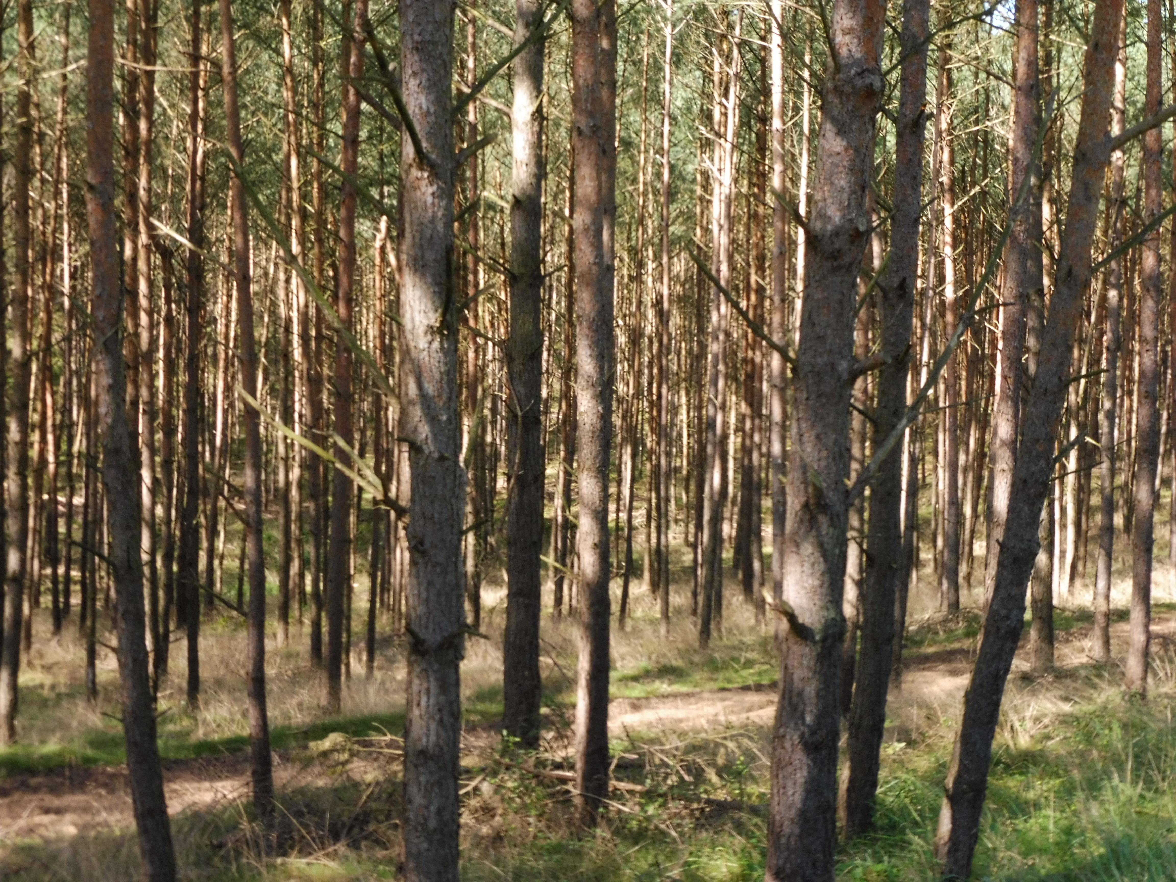 Ausgeräumter Kiefernnutzwald an der B 103 zwischen Karow und Krakow in Mecklenburg